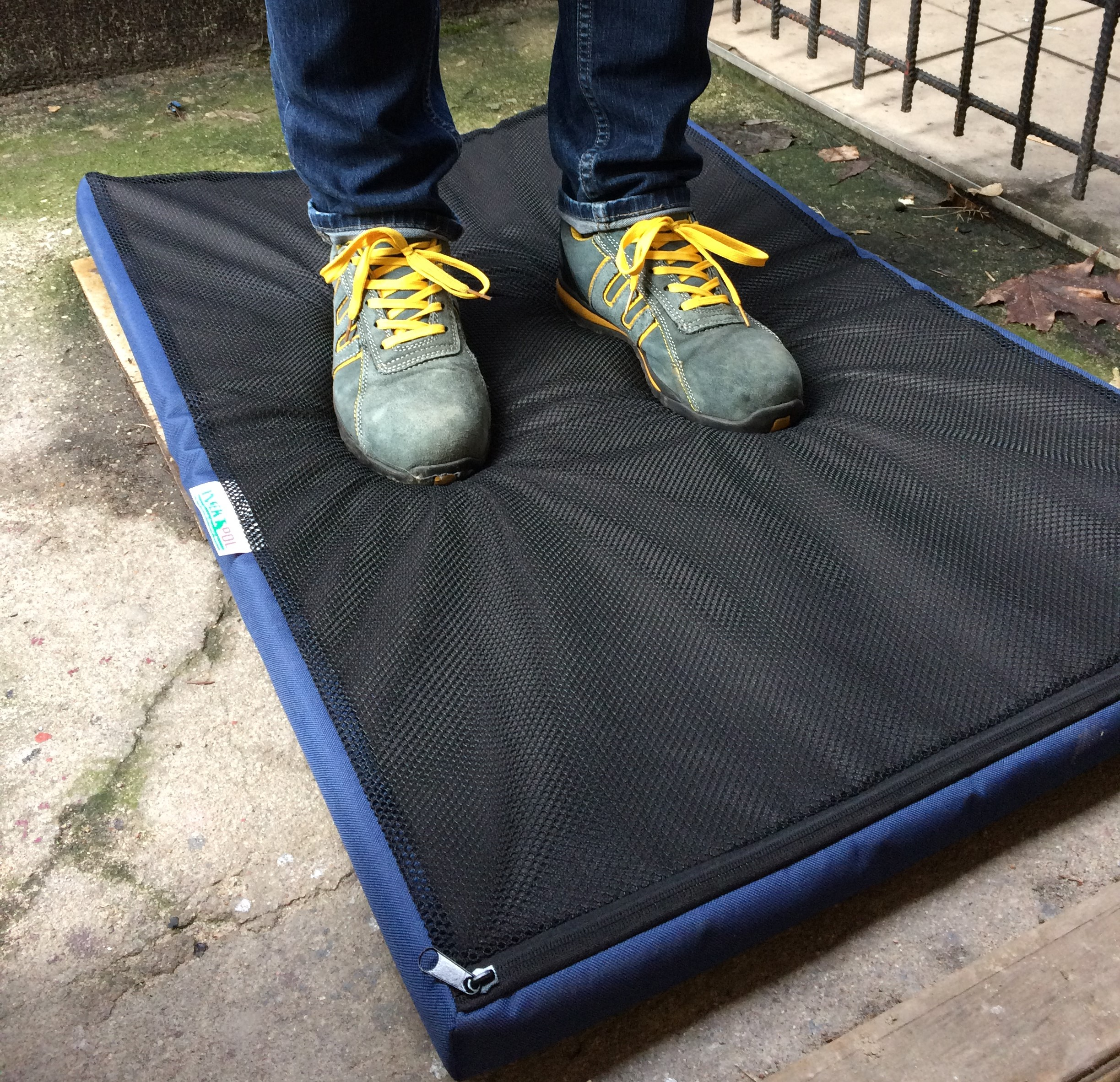 Mata dezynfekcyjna stosowana do dezynfekcji obuwia